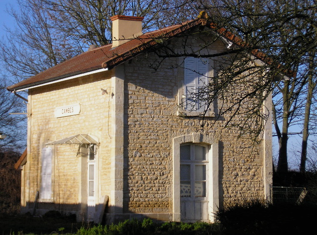 L'ancienne gare de Cambes-en-Plaine.